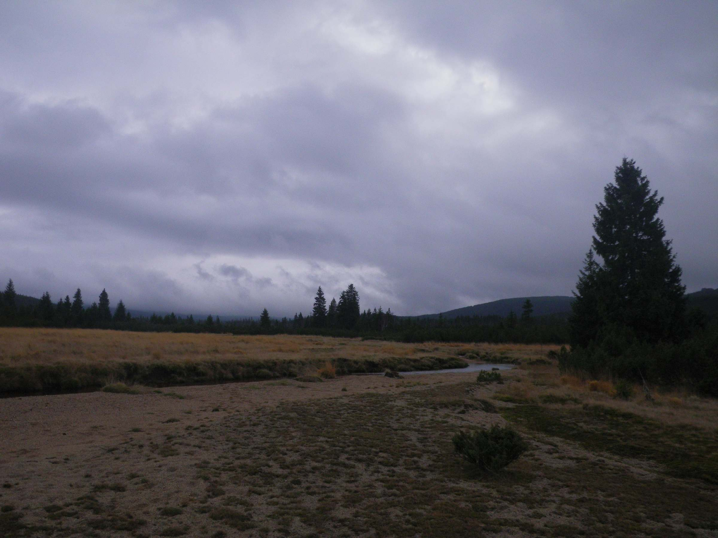 Černá jezera